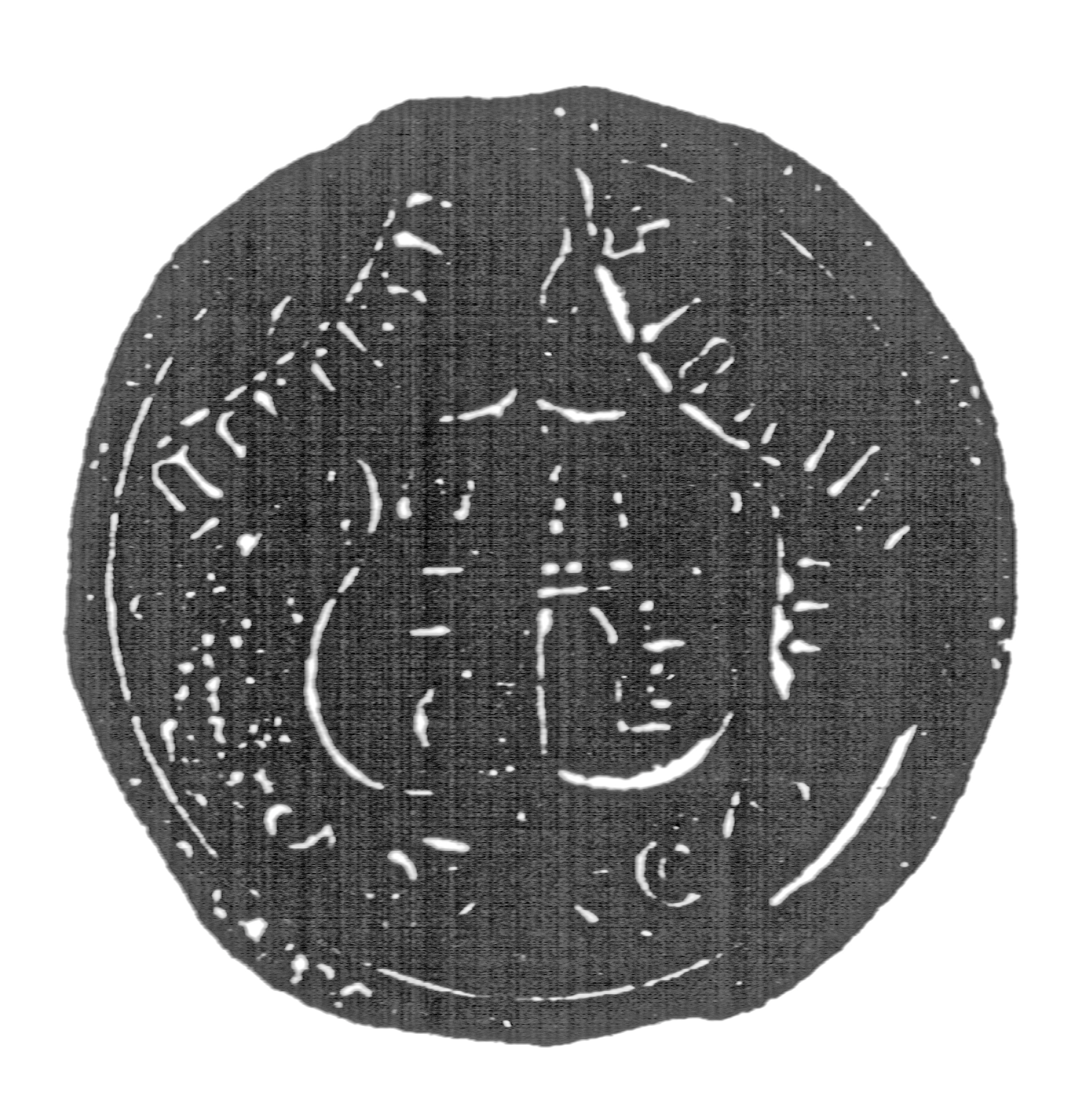 Siegel des Ratsmannes Joachim Ger(c)ken. Das Siegel stammt aus der Zeit um 1516. Siehe Emil Ferdinand Fehling: Lübeckische Ratslinie, Nr. 605 (Joachim Gercken, BM).